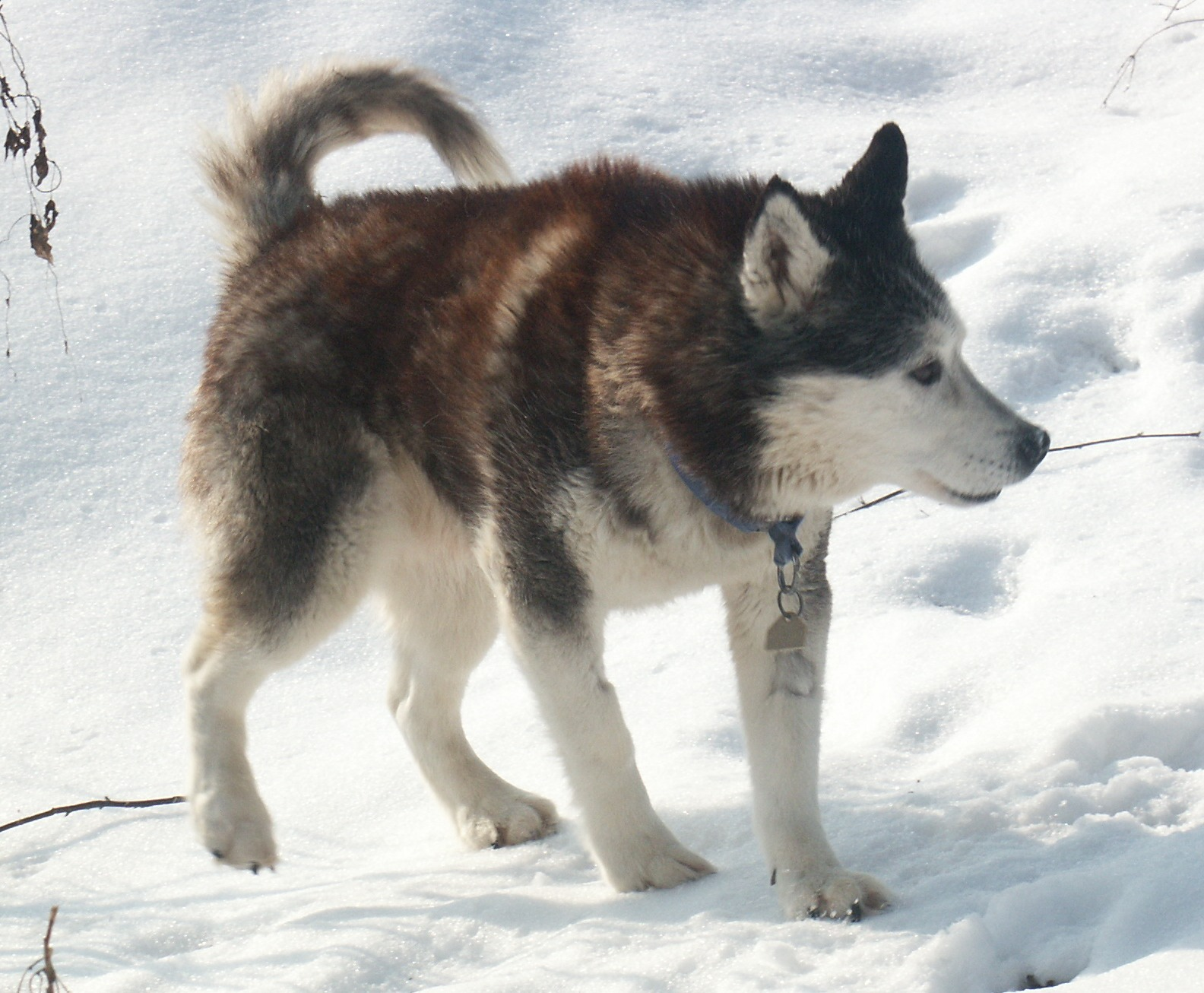 Sibirischer Husky